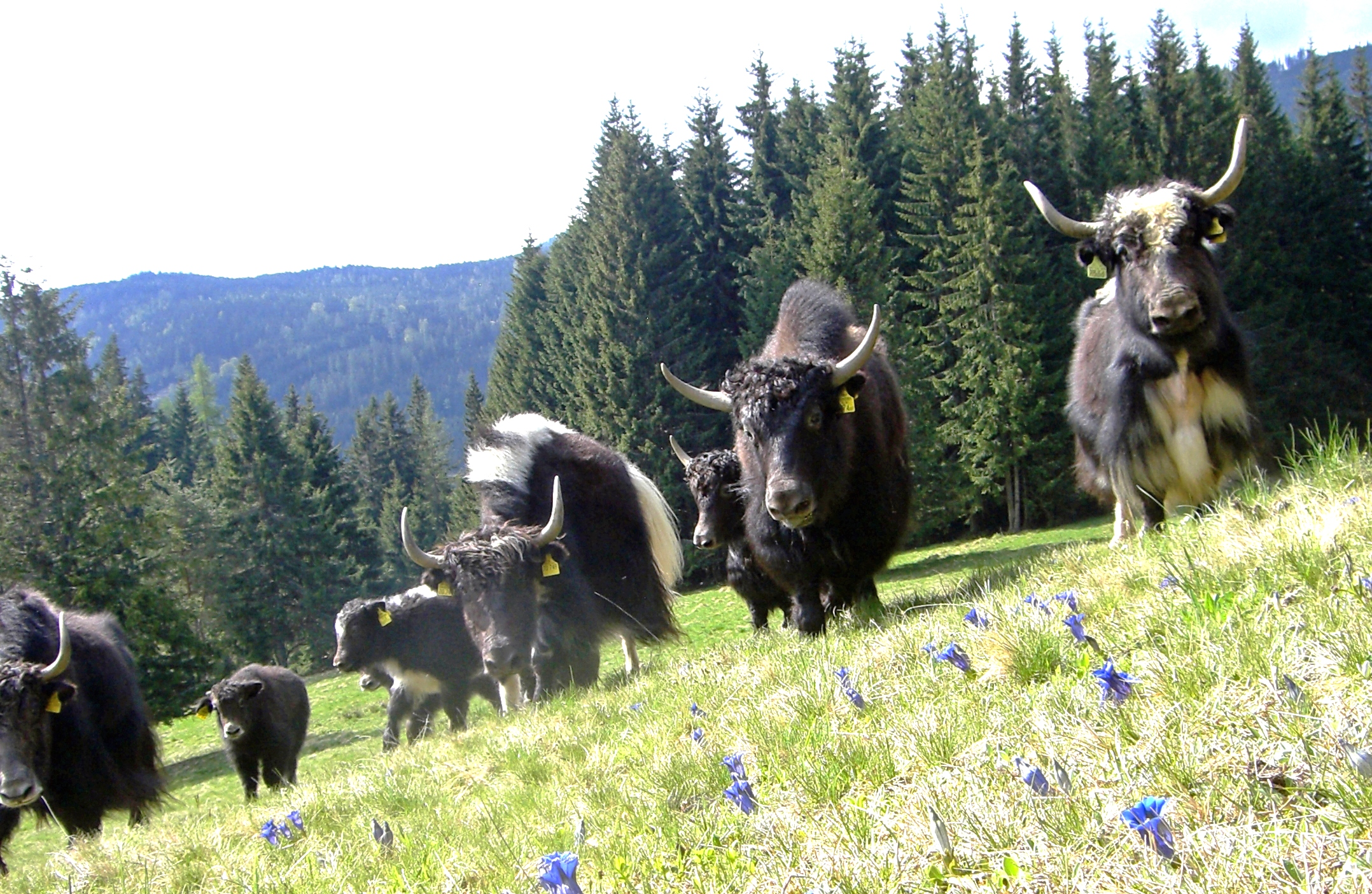 Yakherde auf einer Enzianwiese. Yakzucht Pongratz ( auf der Koralpe, Steiermark, Österreich.